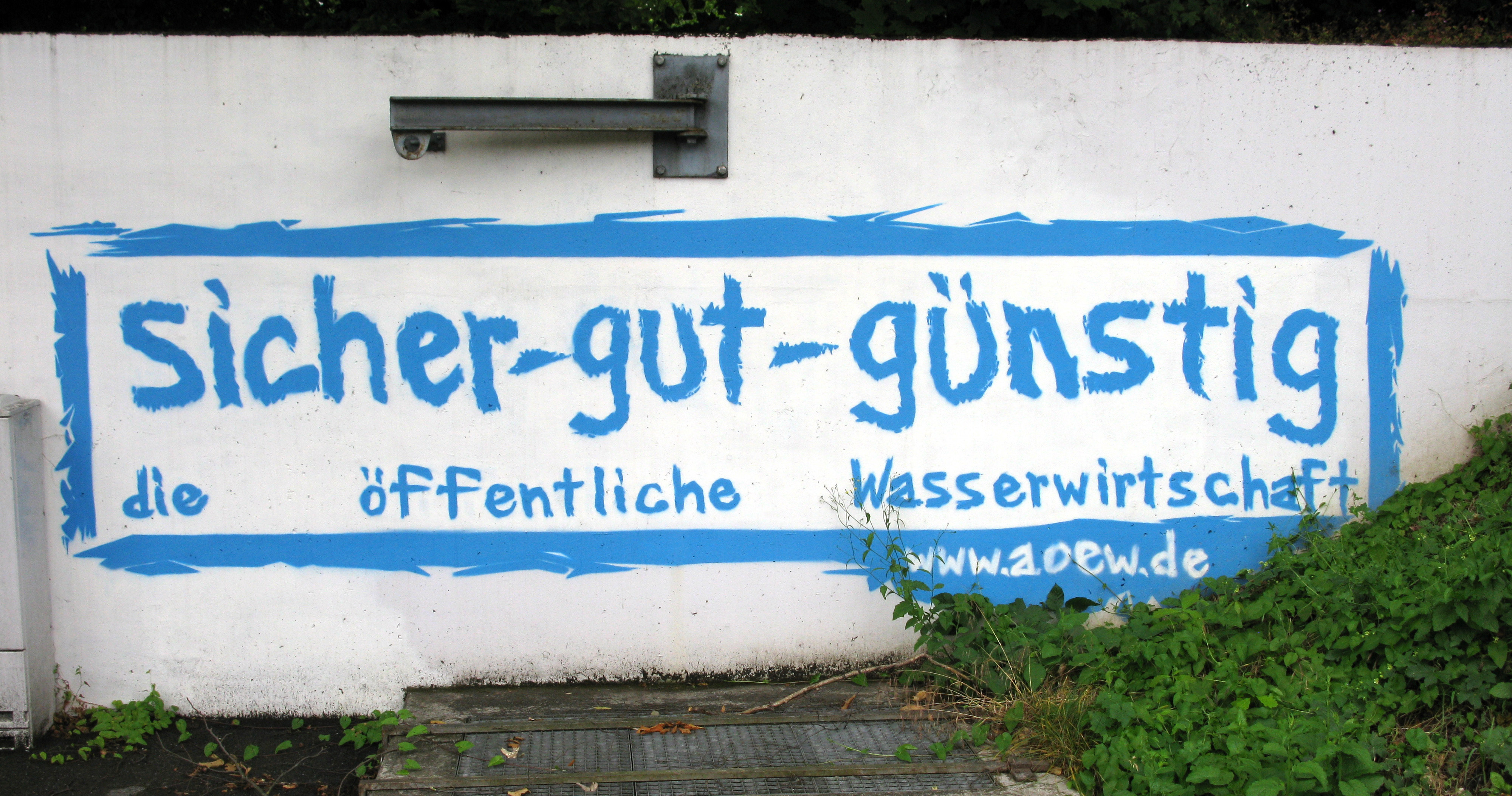 Graffito von Martin Nitsche am Zugangsbau zum Regenüberlaufbecken des Eigenbetriebs Stadtentwässerung der Stadt Freiburg an der Auffahrt zur Paduaallee Richtung Rieselfeld